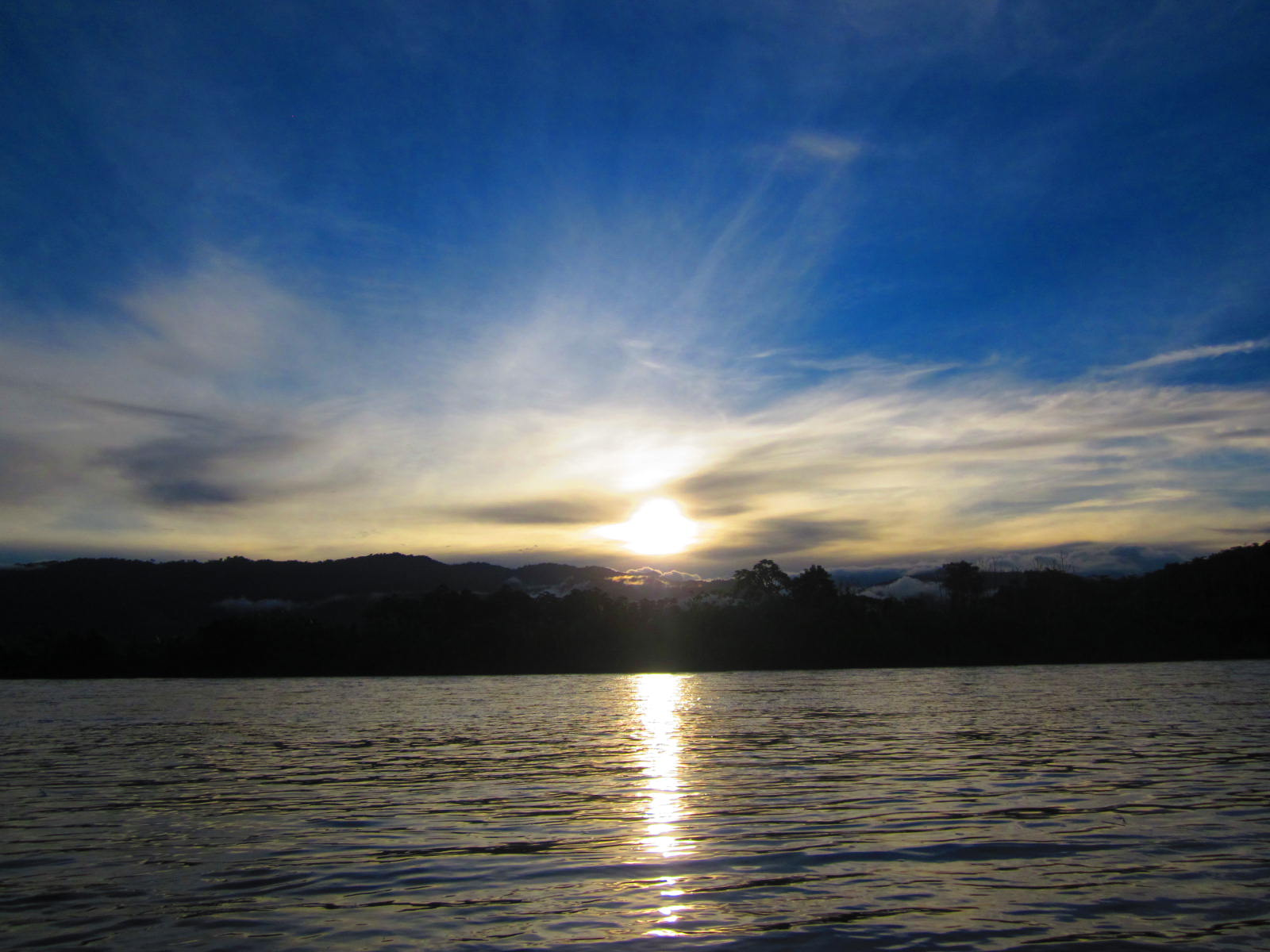 este rio baña el valle del mismo nombre y es un afluente principal y el as caudaloso del Huallaga